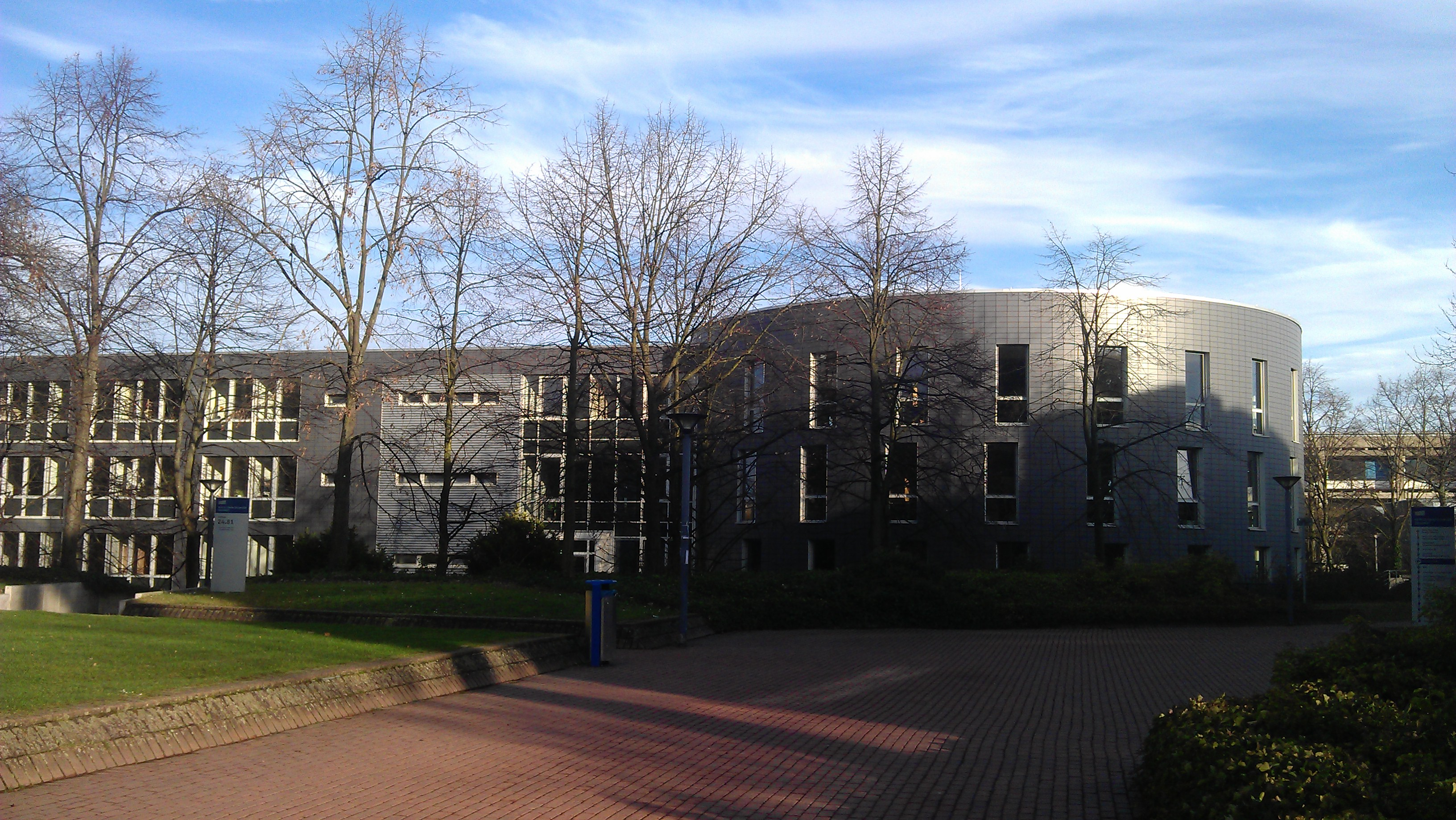 Juristische Fakultät der Heinrich-Heine-Universität Düsseldorf